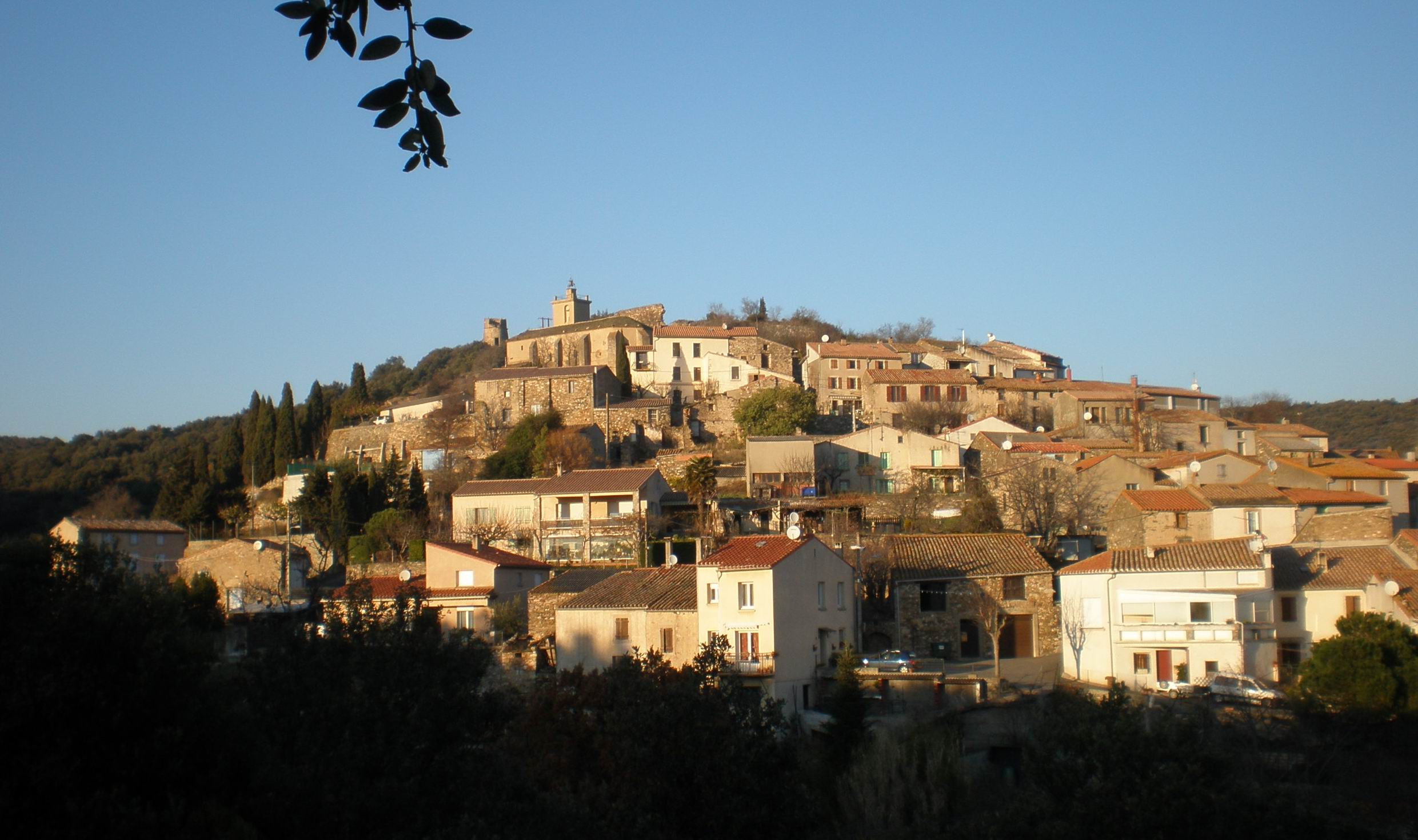 Sallèles-Cabardès (Aude, France).